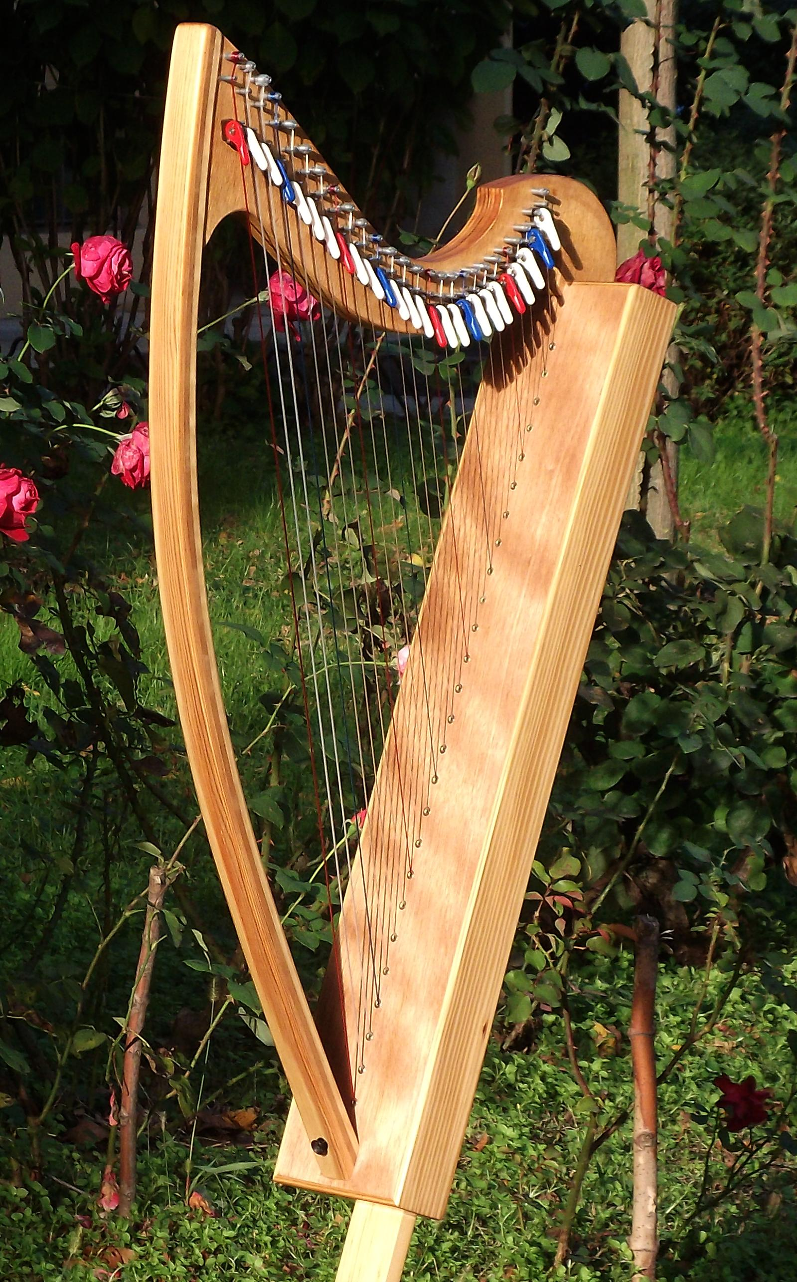 arpa 26 corde